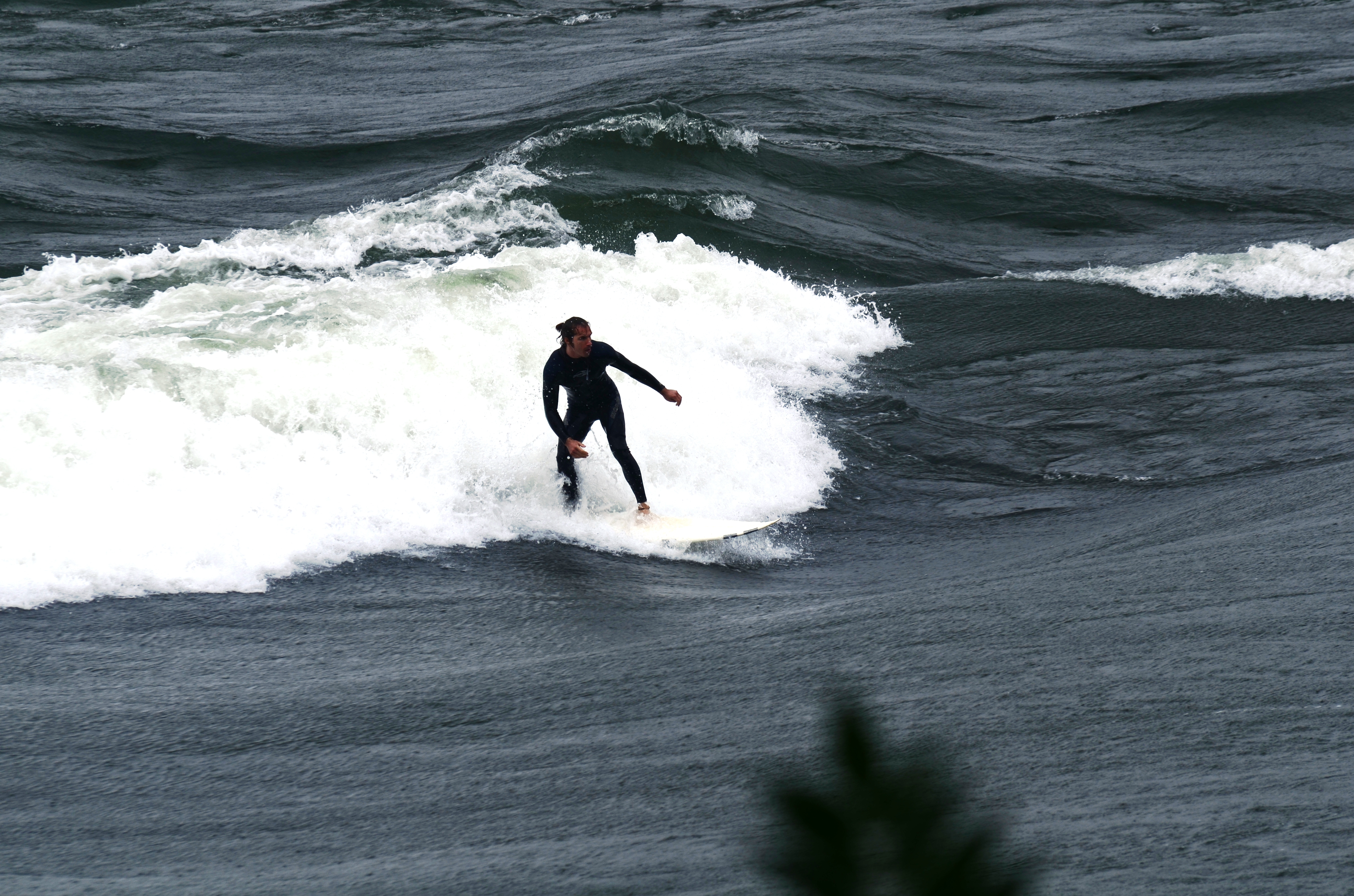 Vague Habitat 67 (surfeurs) in Montréal